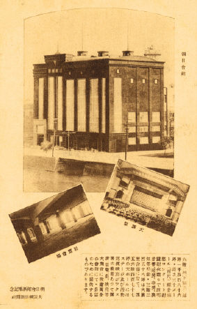 大阪の中之島にかつてあった朝日会館の新築記念の絵葉書。